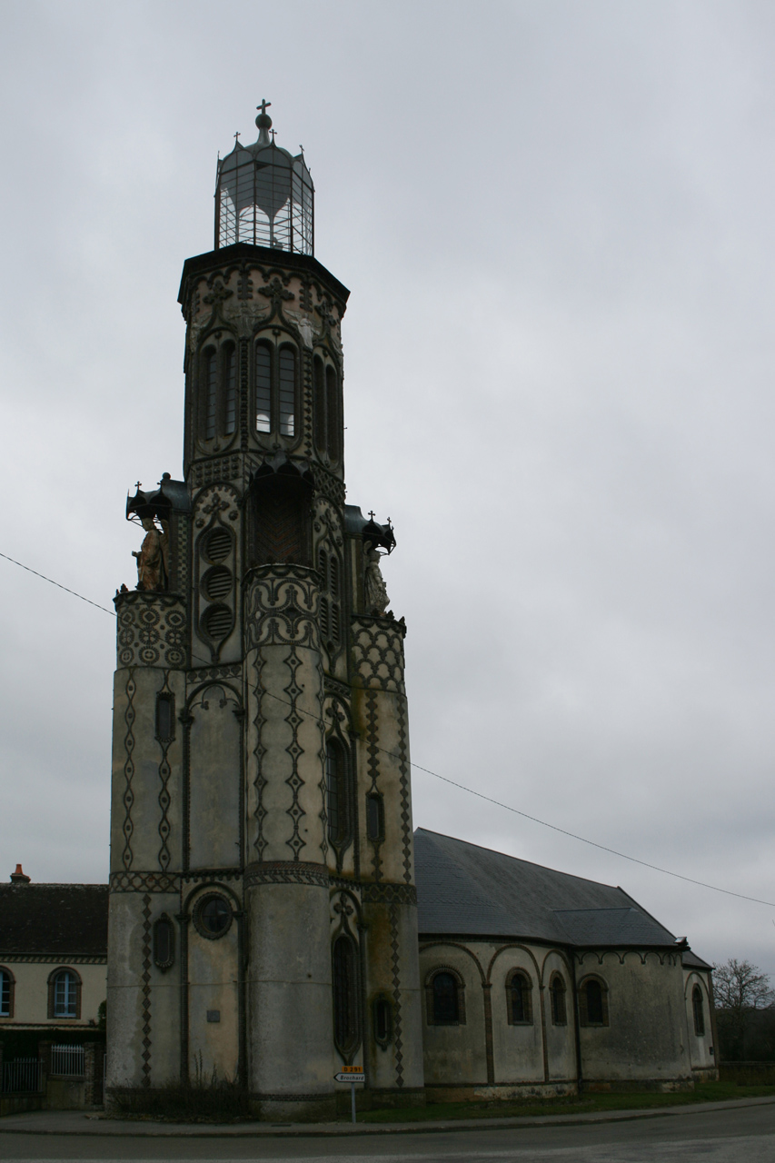 Notre-Dame de la Salette à Maletable (Orne)